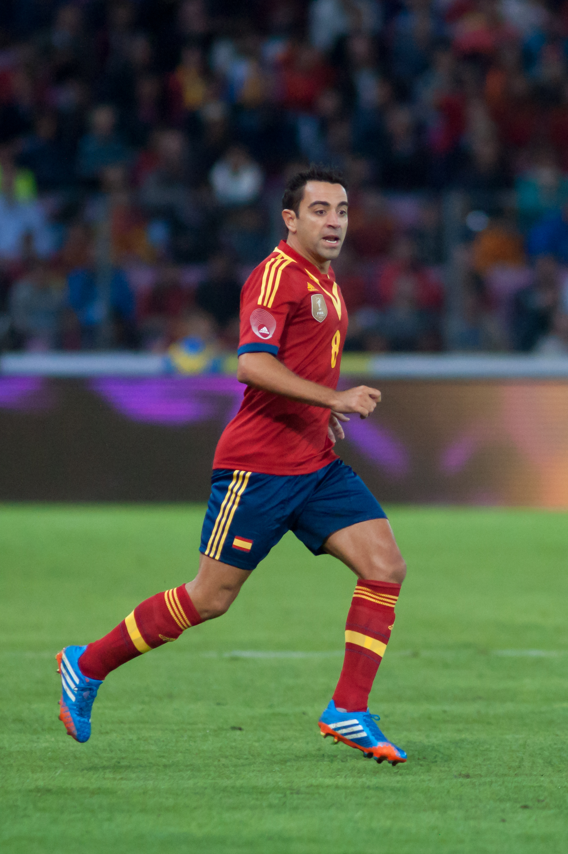 Espagne - Chili, 10 septembre 2013.